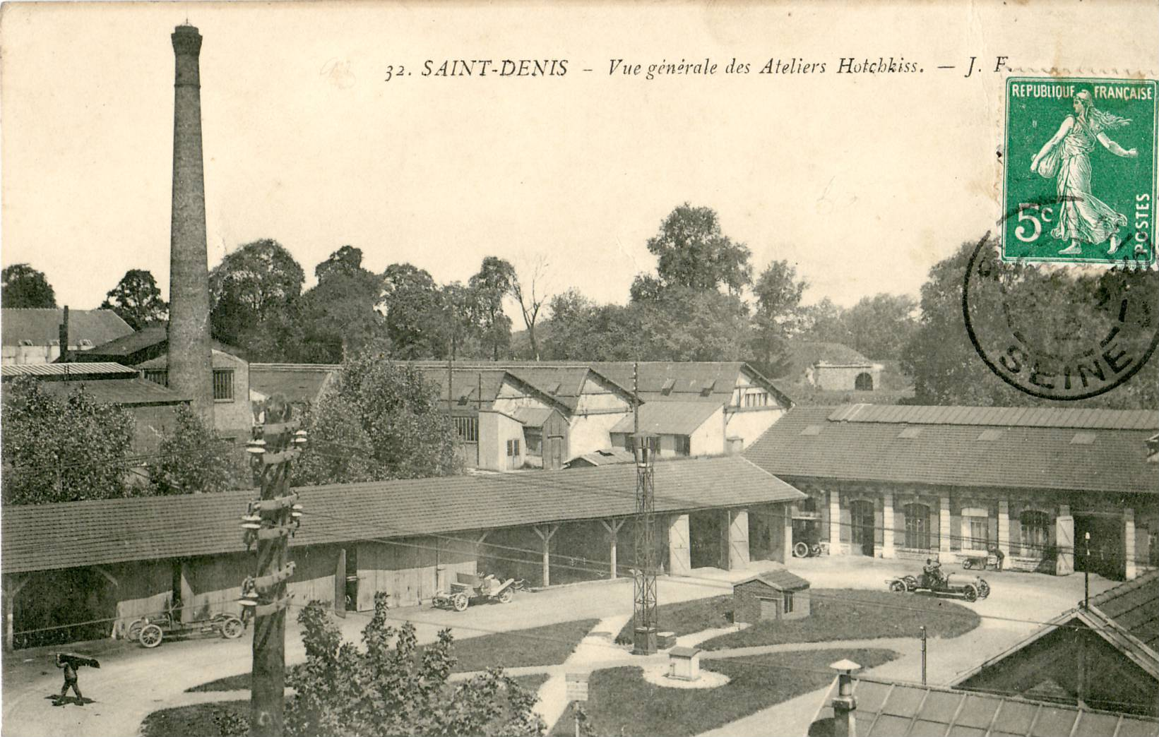 Carte postale ancienne éditée par JF, N°32 SAINT-DENIS : Vue générale des Ateliers Hotchkiss